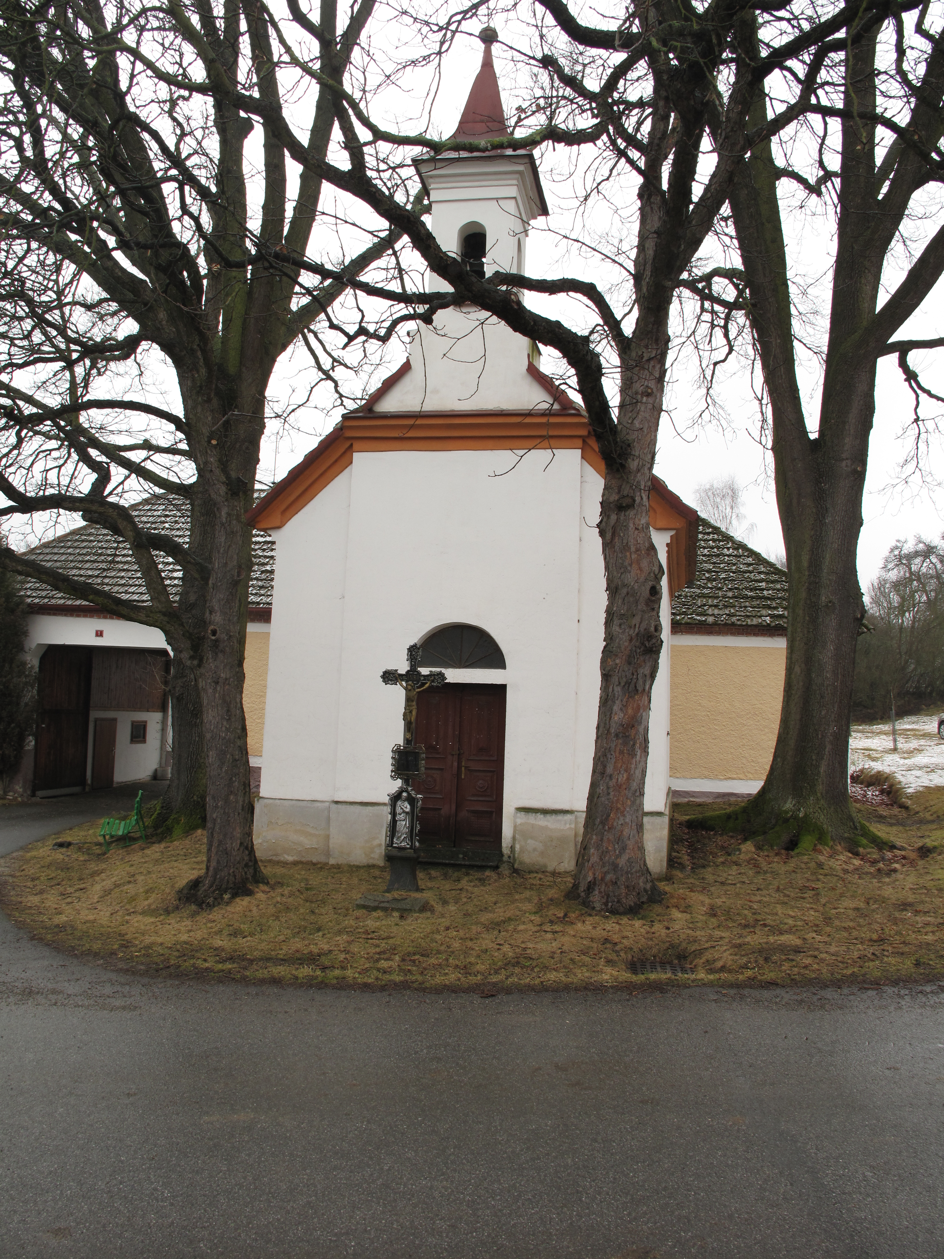 Kaplička v Chrástu. Okres Strakonice, Česká republika.